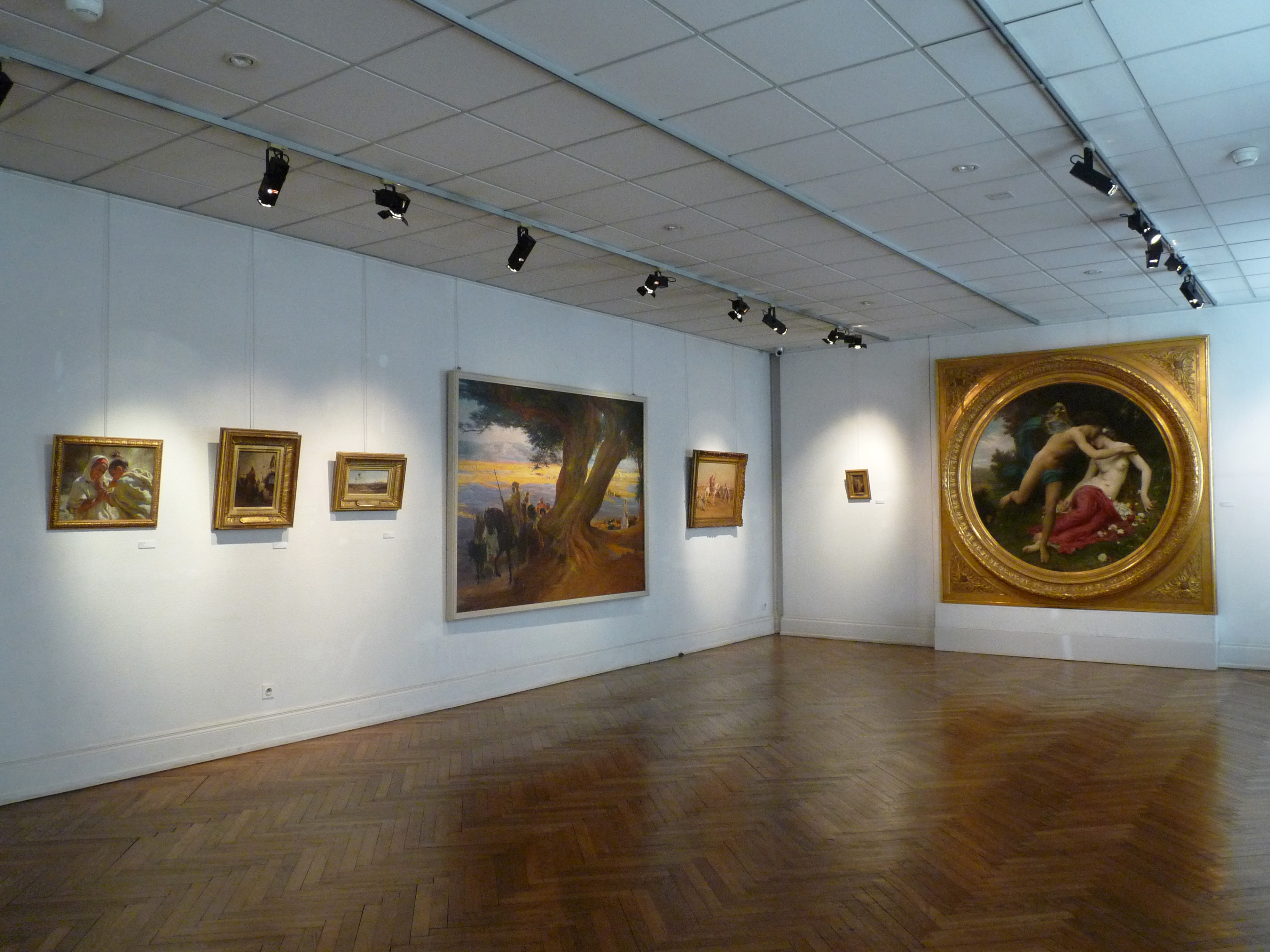 Musée des Beaux-Arts de Mulhouse : salle d'exposition ; à gauche, des orientalistes ; au fond Flore et Zéphir de William-Adolphe Bouguereau